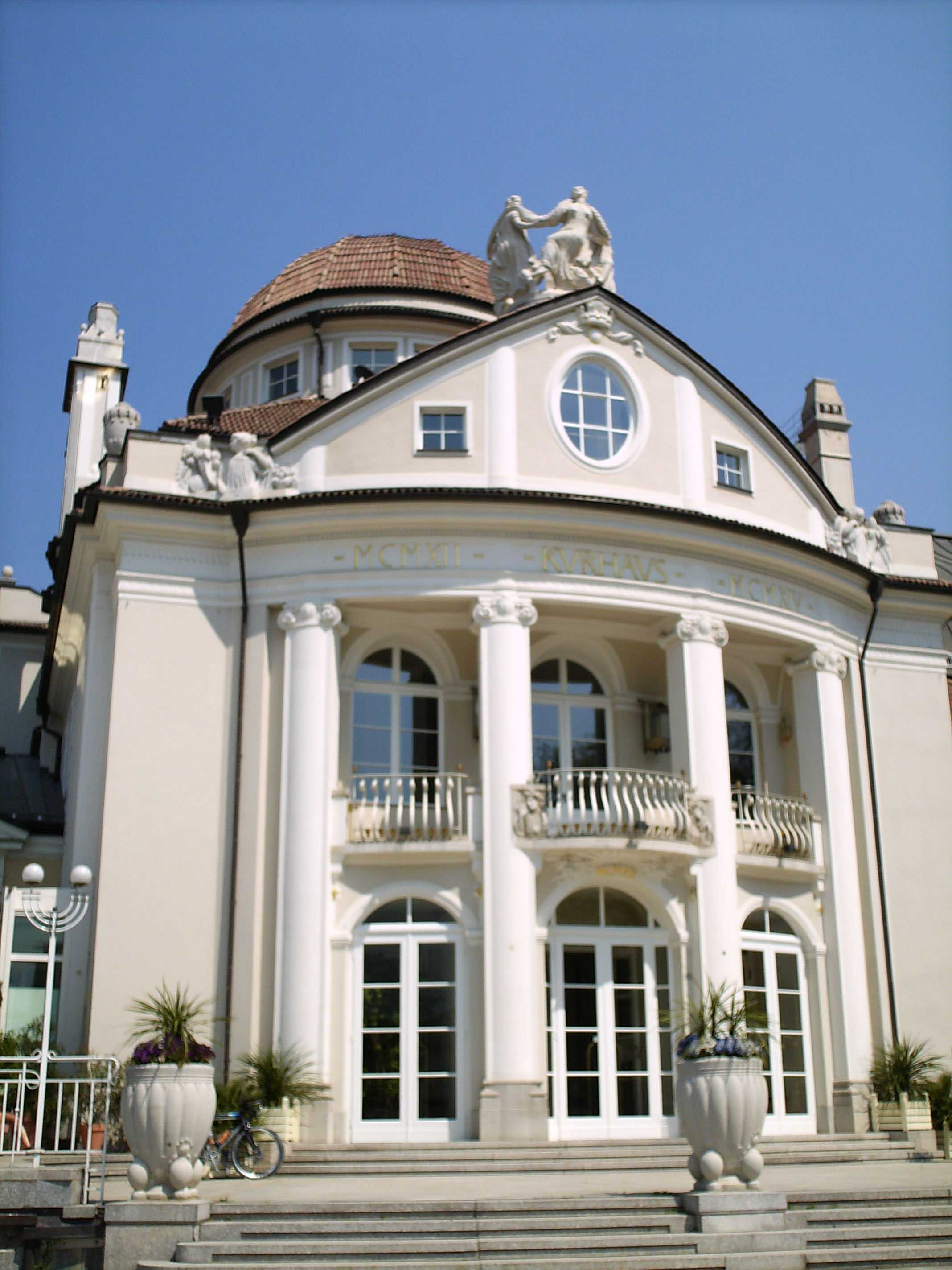 Das Kurhaus in Meran